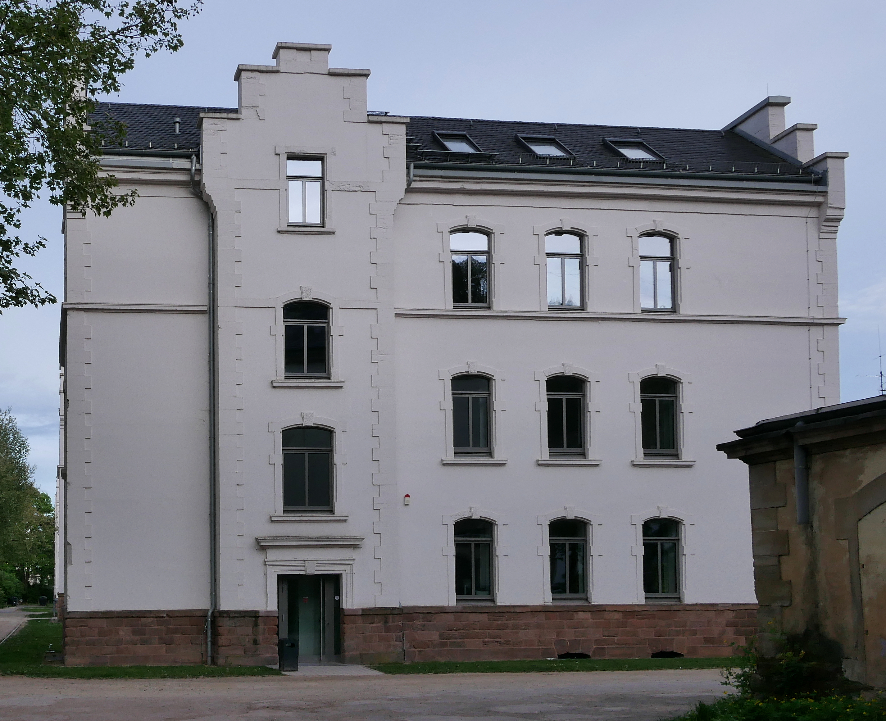 Gneisenau Kaserne (Städtische Kaserne) Trier